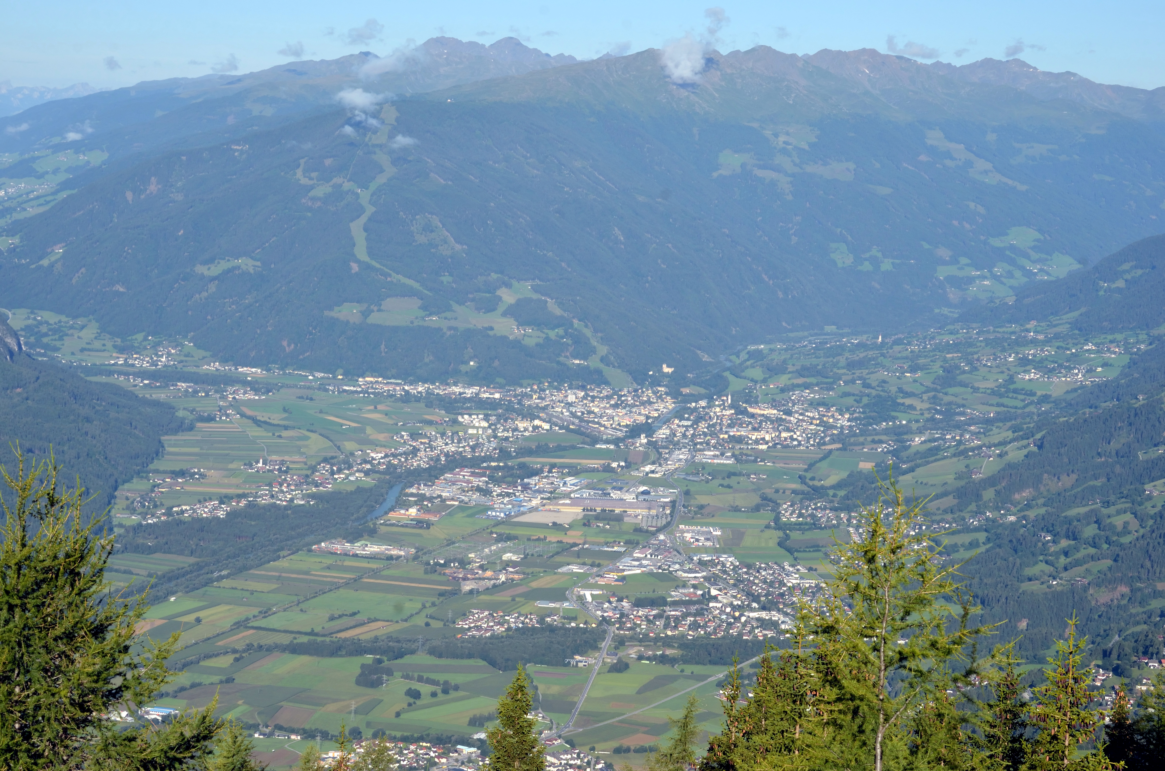 Lienzer Becken und Villgratner Berge vom Anna-Schutzhaus aus gesehen.